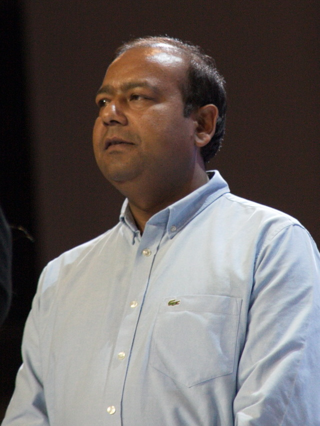 Robert Masih Nahar, senador d'Esquerra Republicana de Catalunya (2017), en un acte de partit de 4/3/17